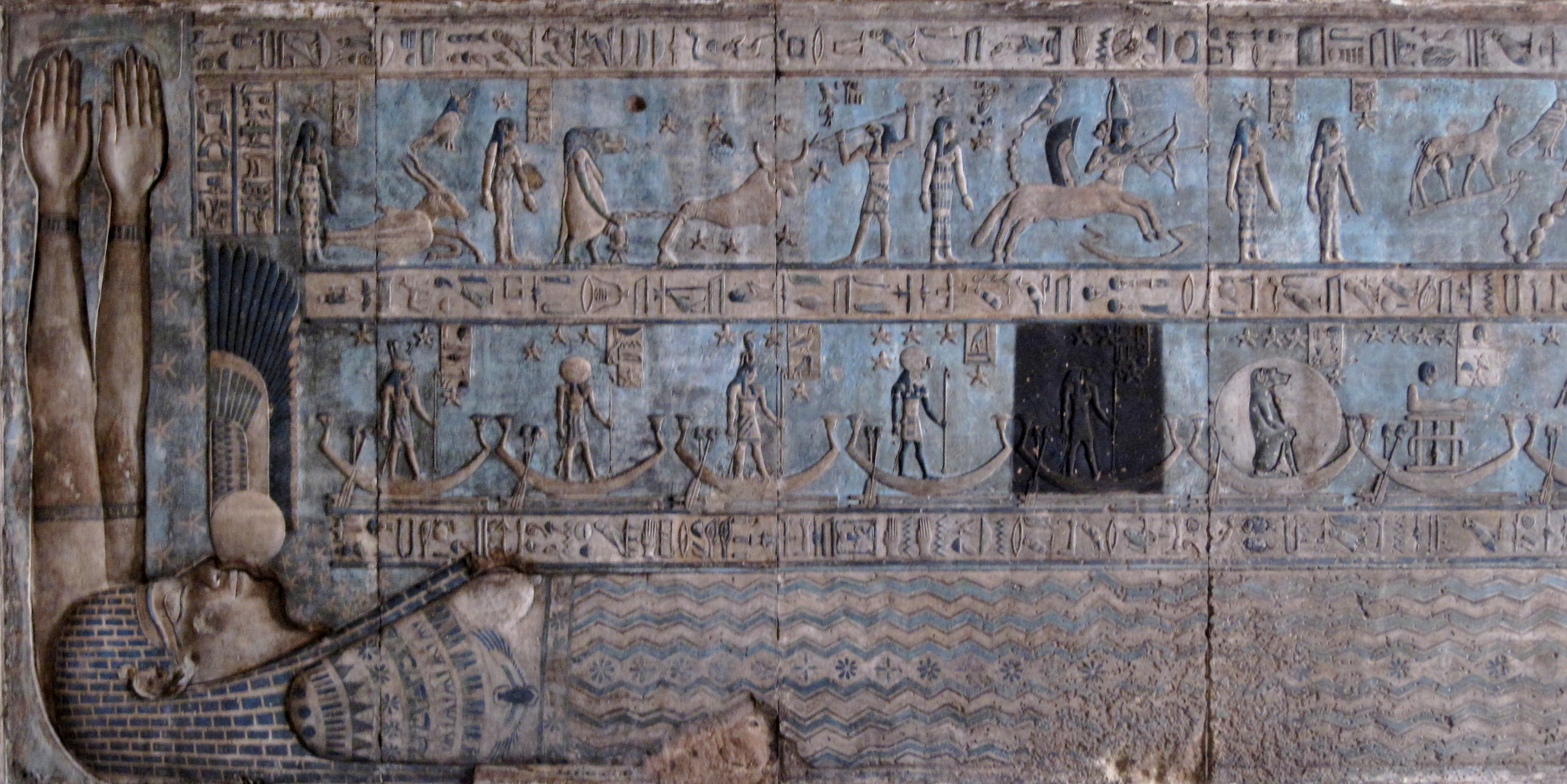 Deckenrelief im Tempel von Dendera, Ägypten